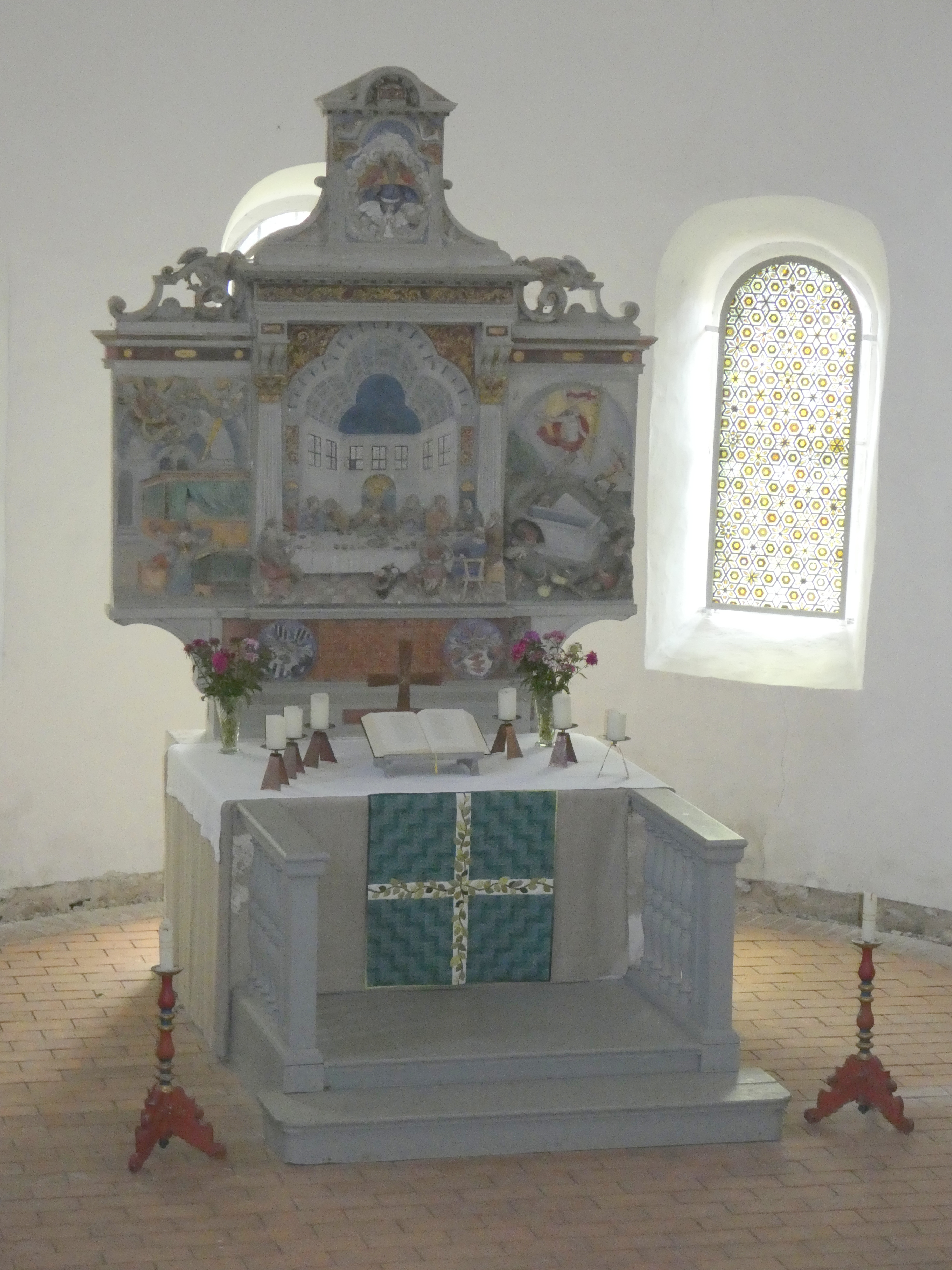 Altar Wiesenburg